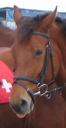 3-ring/Pessoa Gag Bit